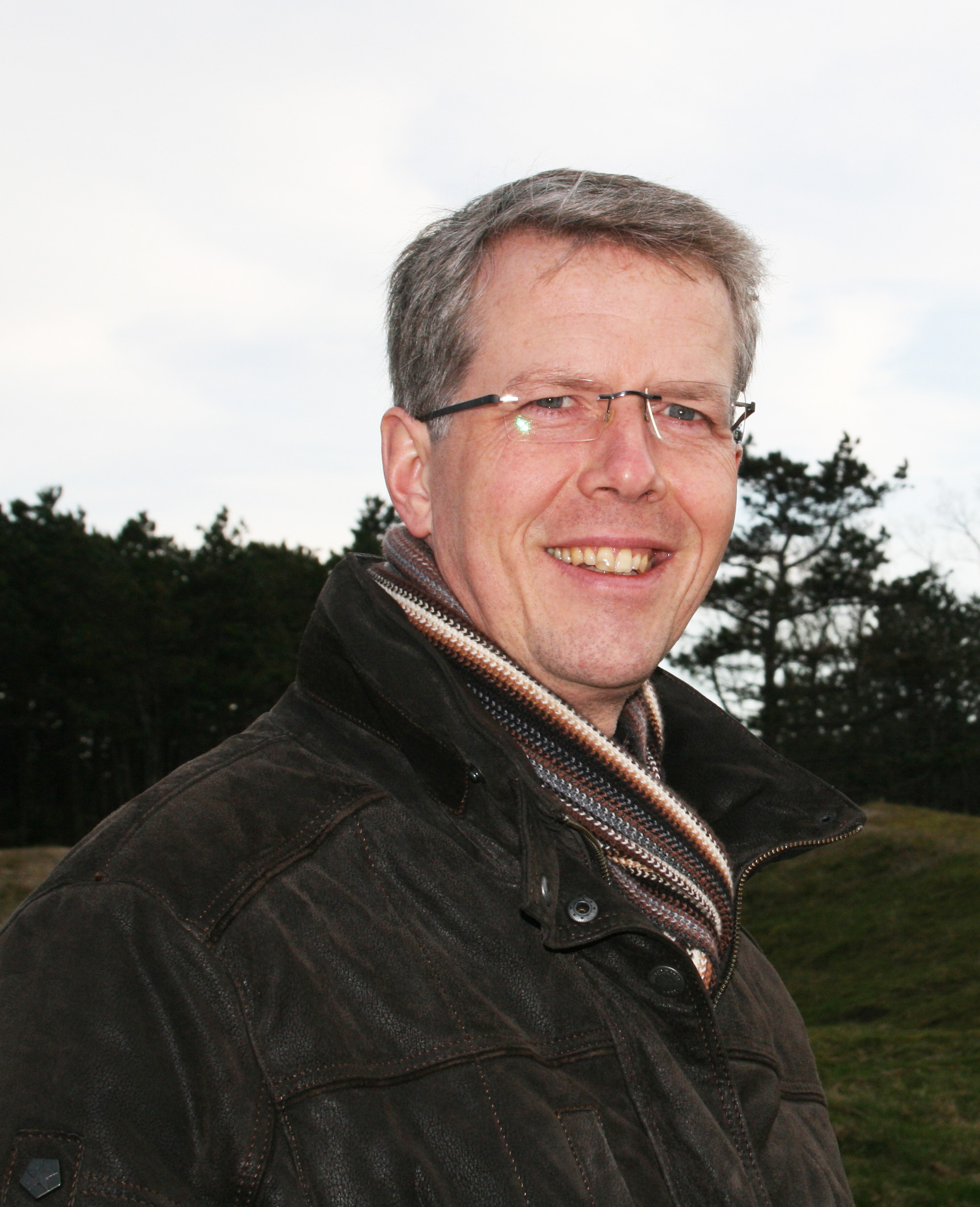 Filip Martijn van As